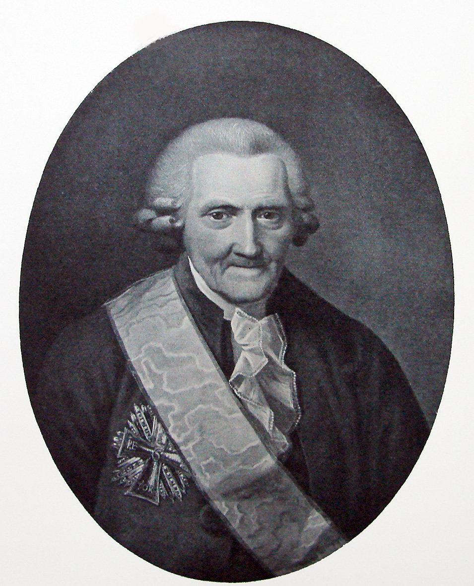 Henrik Stampe 1713-1789, jurist, generalprokurør og statsminister.